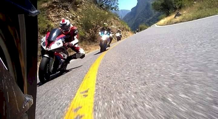 Motocicletas en las curvas de la carretera ( llegando a Iturbide desde Linares )